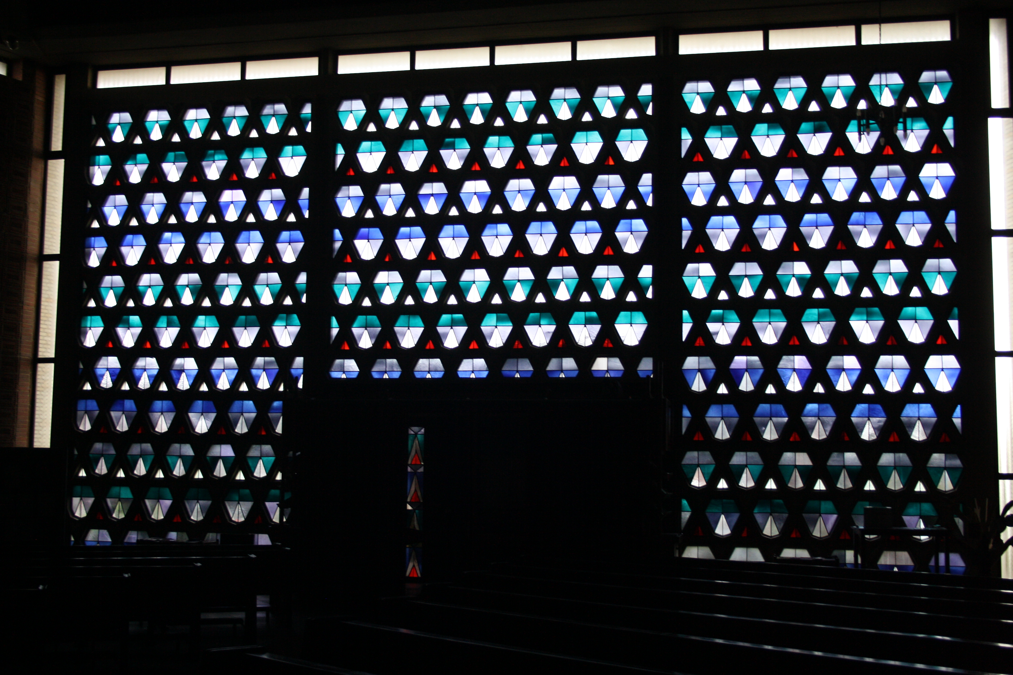 Heilig-Geist-Kirche (Stade